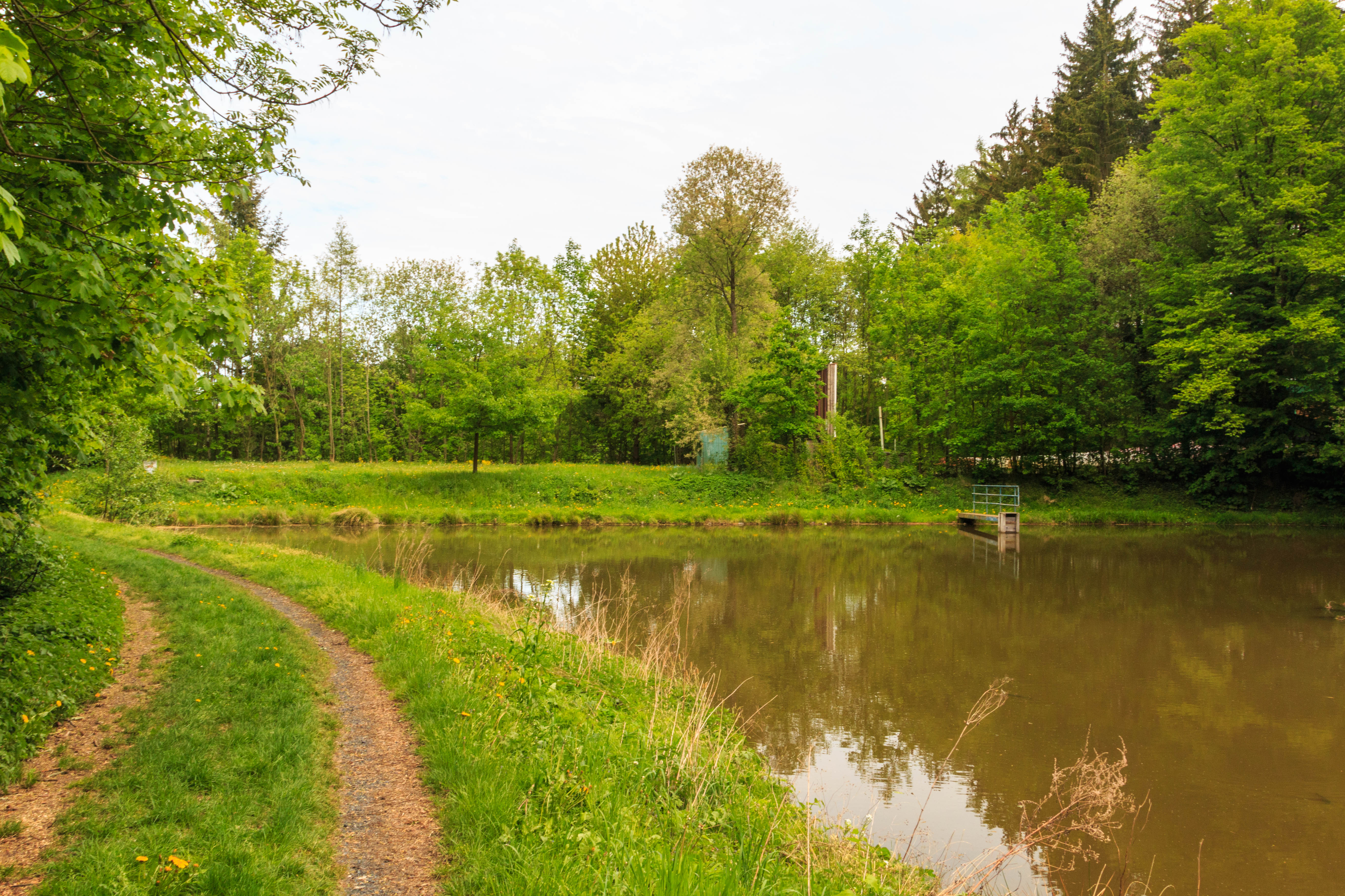 Rybník Rohlík u Konopáče Project: Vodstvo.